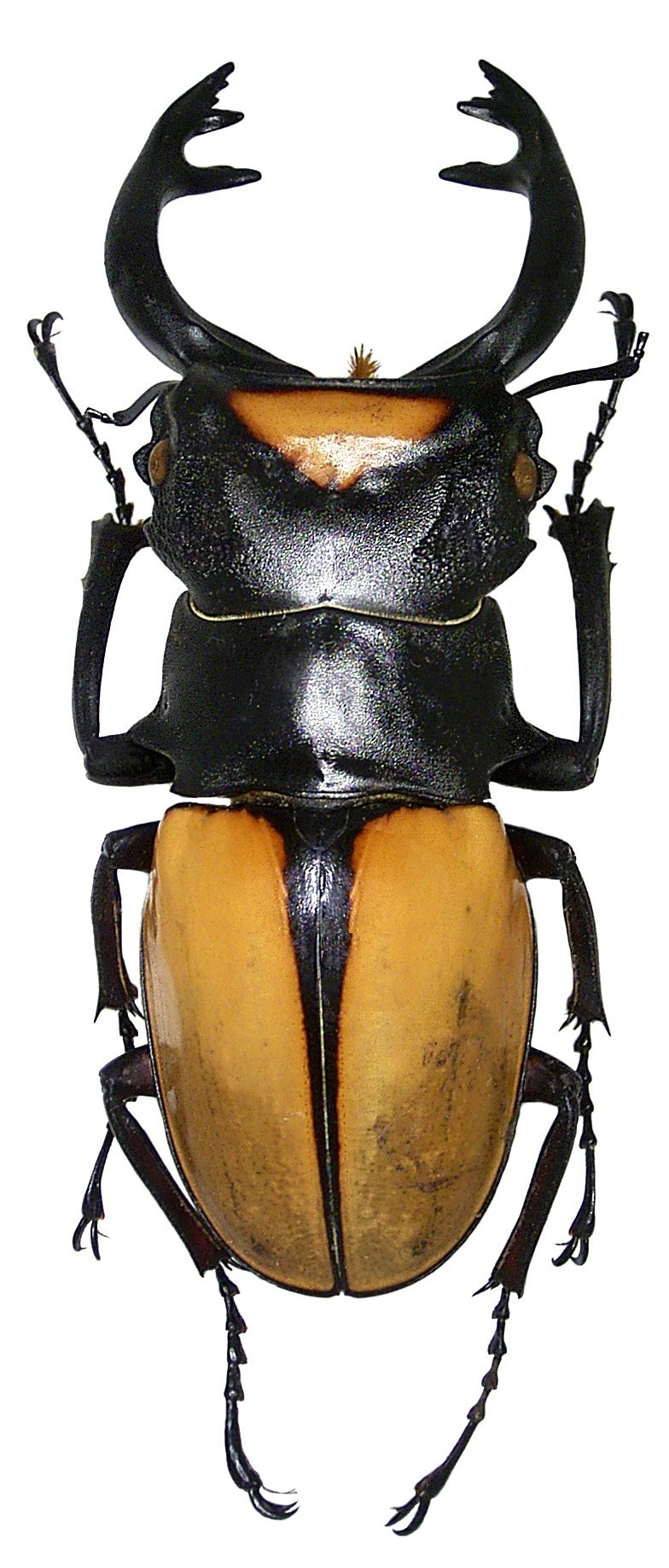 Familie: Lucanidae Grösse: 44-90 mm Fundort: Indonesien, Sumatra leg.2006; det. A.Skale Foto: U.Schmidt, 2007